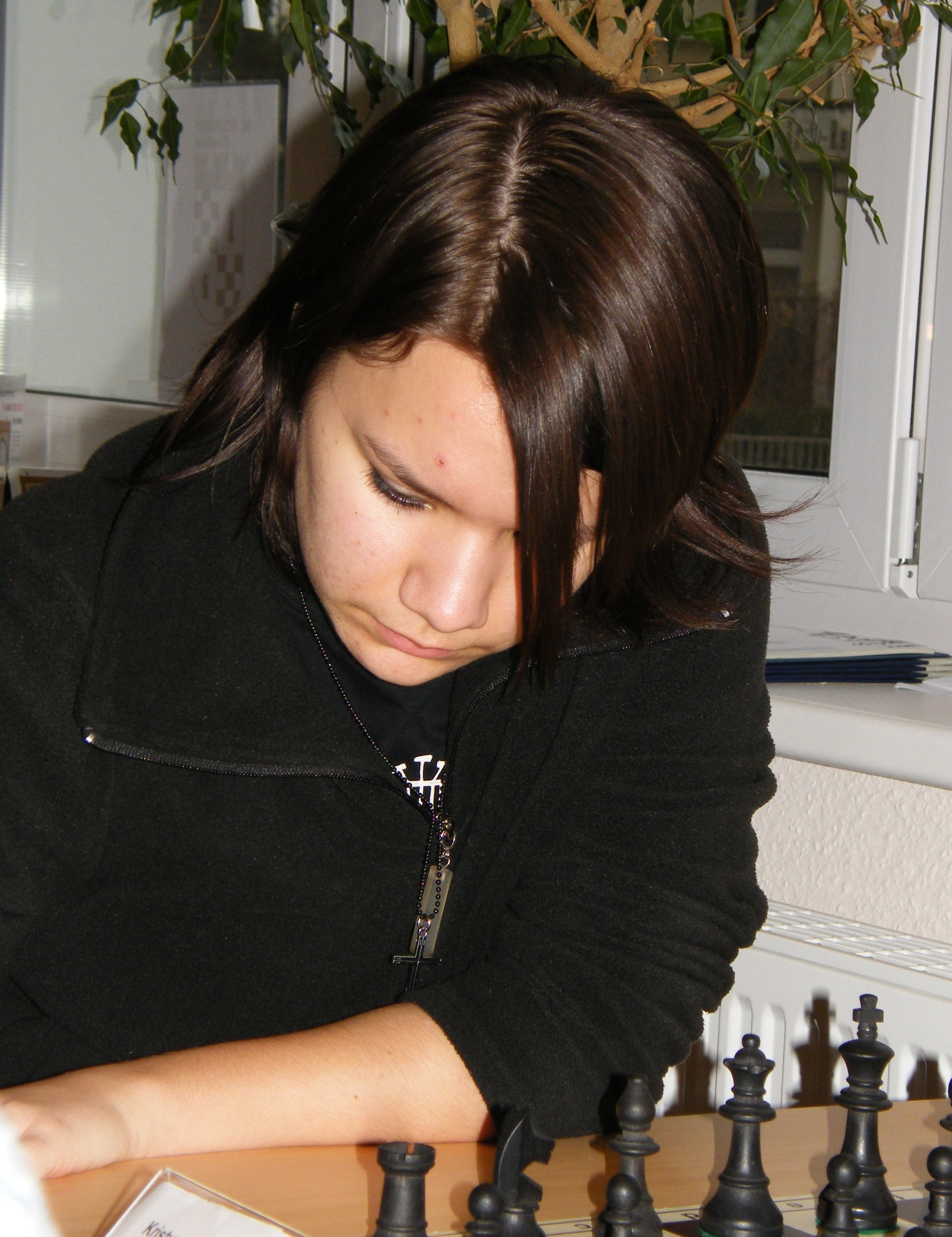 Kristyna Havlikova bei der 8. Runde der Frauen-Bundesliga in Berlin